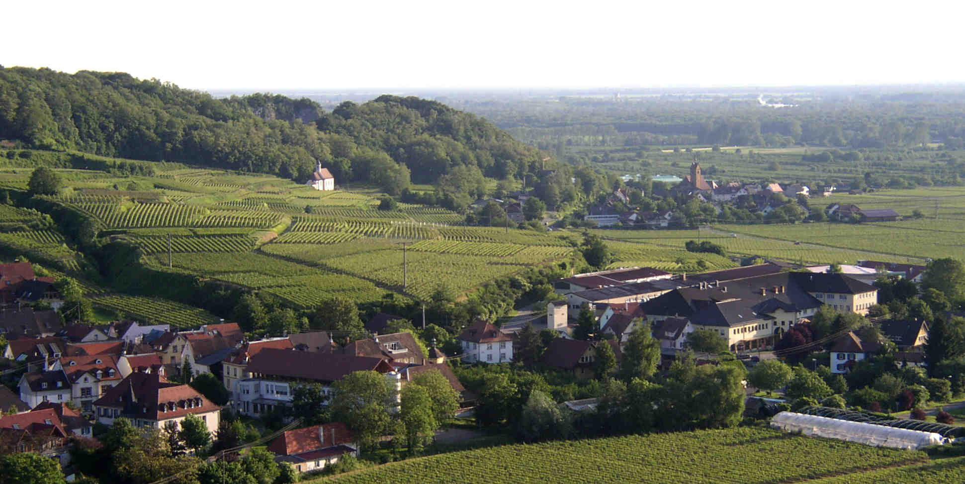 Mer siiht e Deil vum Underdorf (Vordergrund), rächts dr "Winzerkäller" (dr groß Boikomplex vum Winzerverein). Obe ("Under em Wald") s Bandalion-Kirchli. Rächts "Under em Wald" Niiderrothwiil mit dr St. Michaelskirch.